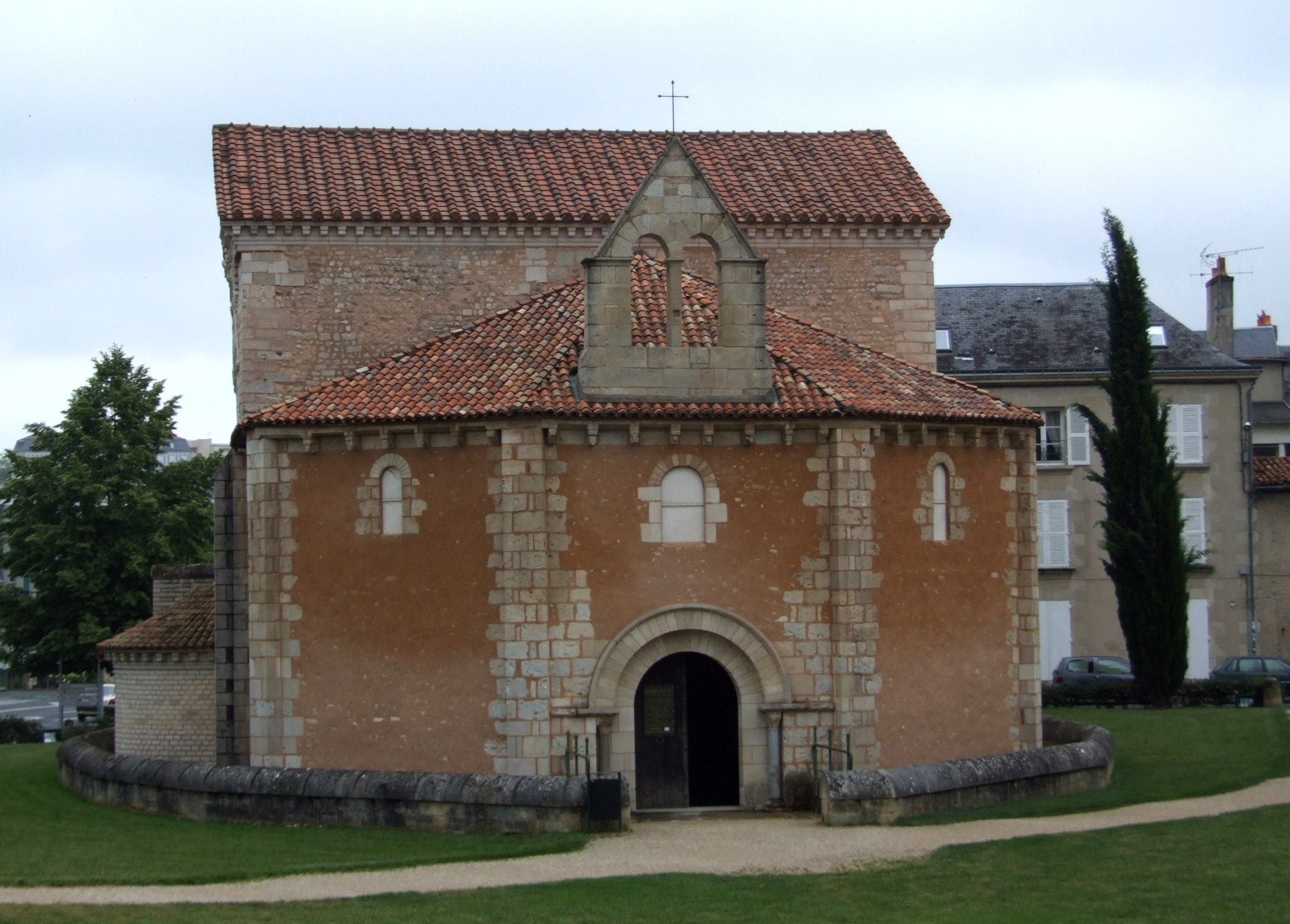 Baptistère Saint-Jean, Poitiers, Poitou-Charentes, FRANCE